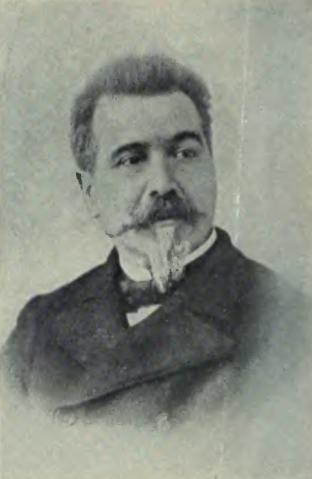 Foto d'Emili Vilanova de la porta del llibre: VILANOVA, Emili, Gent de casa, Ilustració Catalana, Estampa de J. Thomàs, Barcelona, 1906.